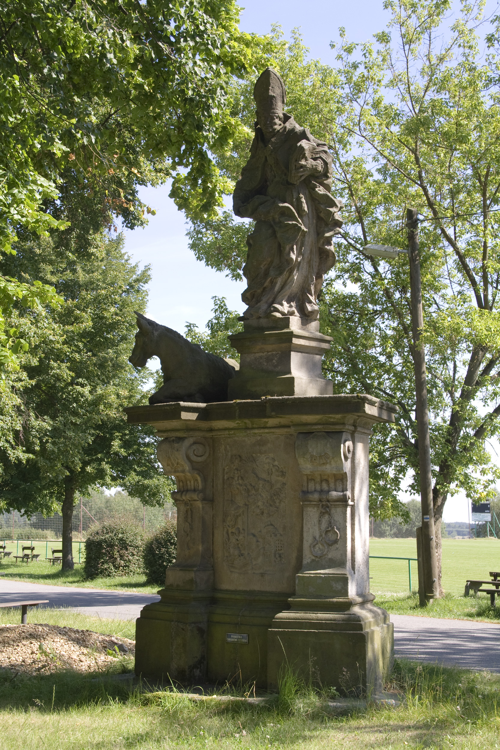 Kostel svatého Linharta s farou, Hlavice (okres Liberec).